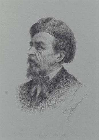 Ritratto di Edoardo Perotti, incisione, 88 x 114 cm., Pinacoteca Tosio Martinengo, Brescia